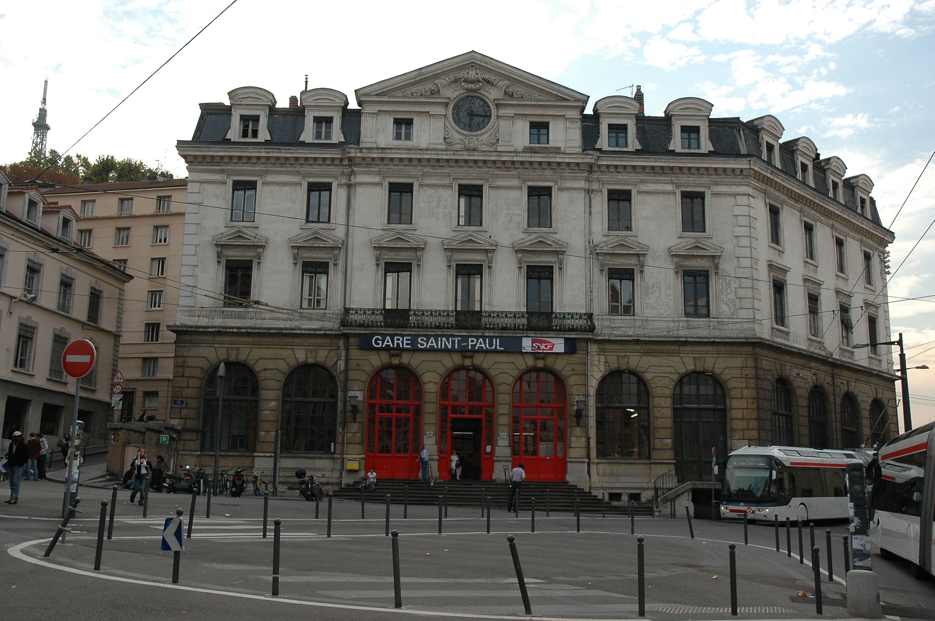 Gare St-Paul à Lyon. A droite les bus électriques de la ligne C3.